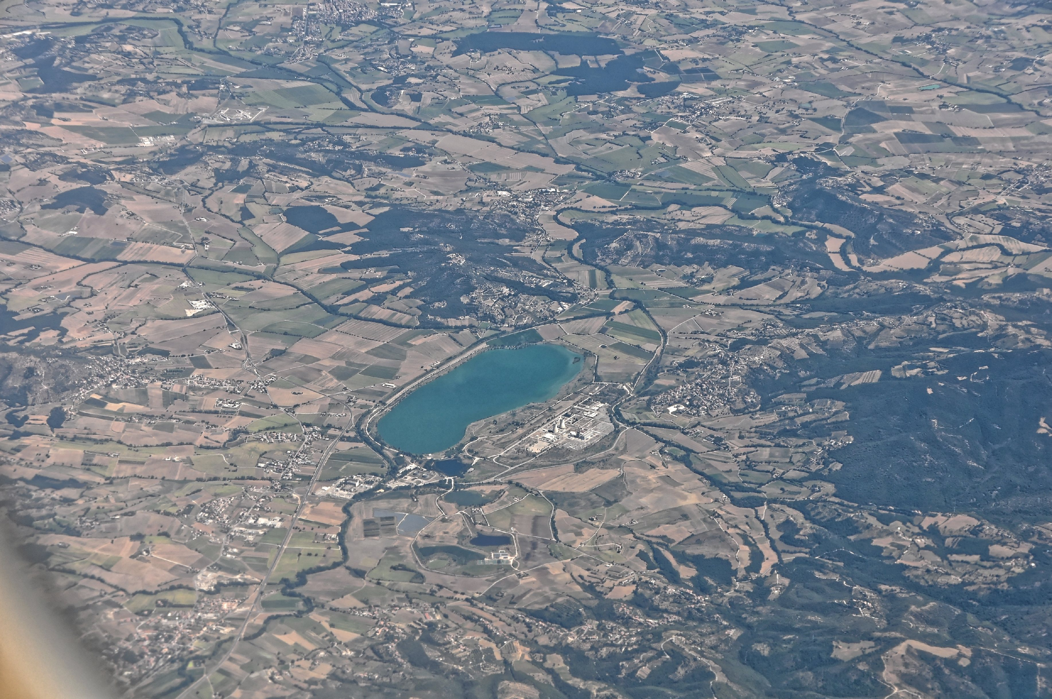 Bilder vom Flug -Rom-Düsseldorf-Hamburg 2013 Dieses Foto entstand in Zusammenarbeit mit Stadtbesichtigungen.de Die Seiten Stadtbesichtigungen.de, der dazugehörige Reise Blog sowie die Facebookseite: Stadtbesichtigungen Rom dürfen dieses Bild für Ihre Veröffentlichungen ohne den Hinweis auf Wikipedia, Commons bzw der Lizenz verwenden. Die Verantwortlichen habe von mir (Ra Boe) die Originaldaten zur freien Verfügung übermittelt bekommen.